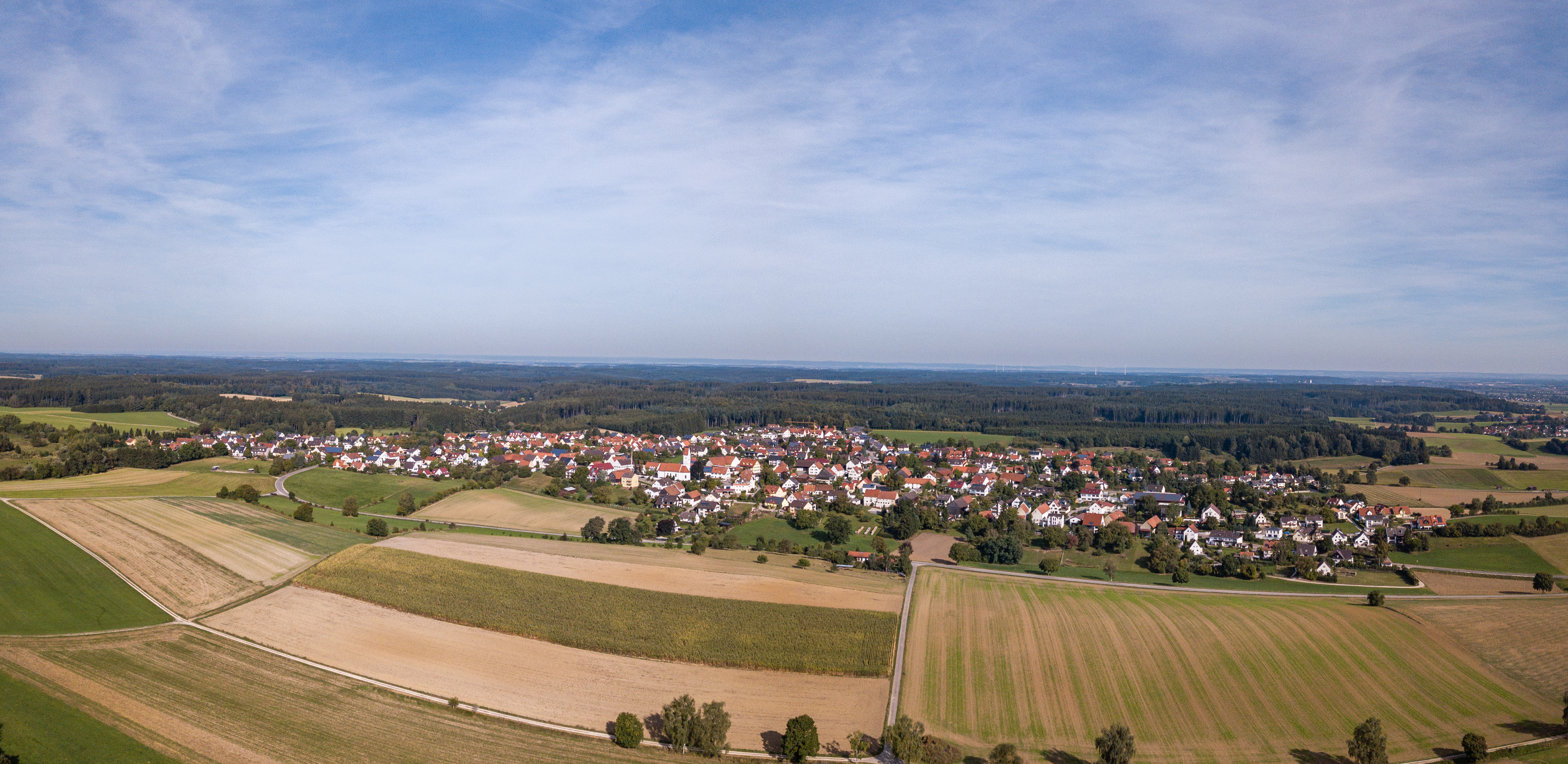 Lützelburg, ein kleines Dorf in der Gemeinde Gablingen, nördlich von Augsburg (Bayern, Deutschland) mit umliegenden Wiesen und Wäldern aus der Luft mit Blickrichtung Norden gesehen